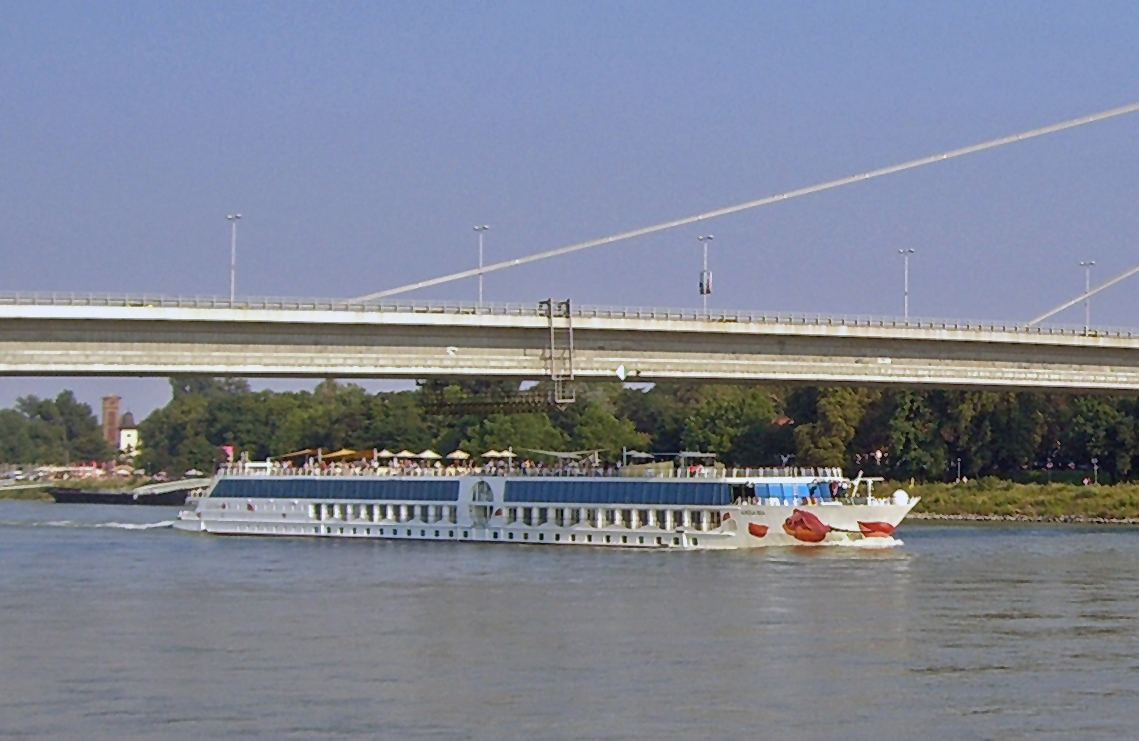 A-Rosa Riva von A-Rosa Flussreisen unterhalb der Ufo-Brücke in Bratislava.